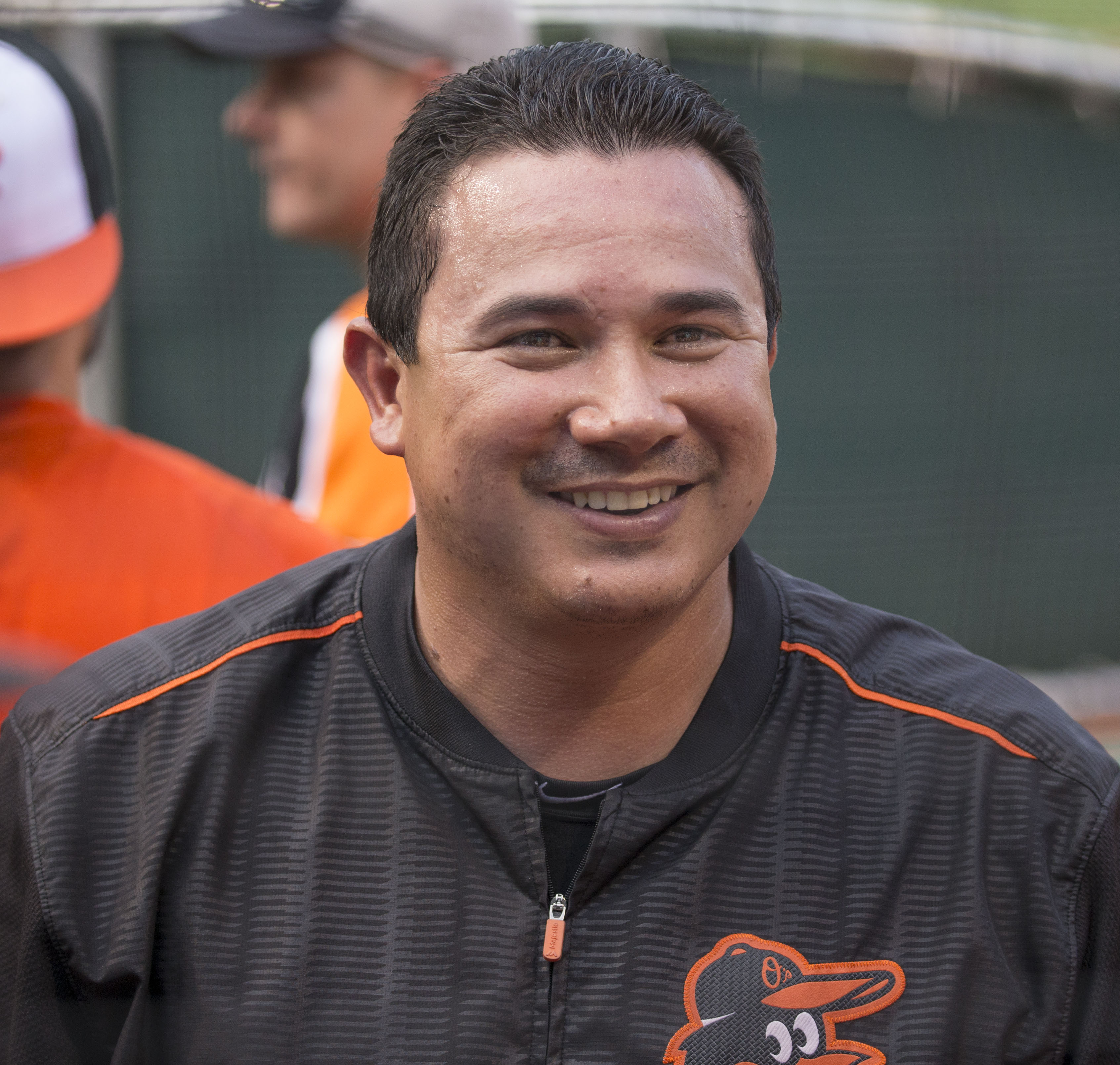 Einar Díaz